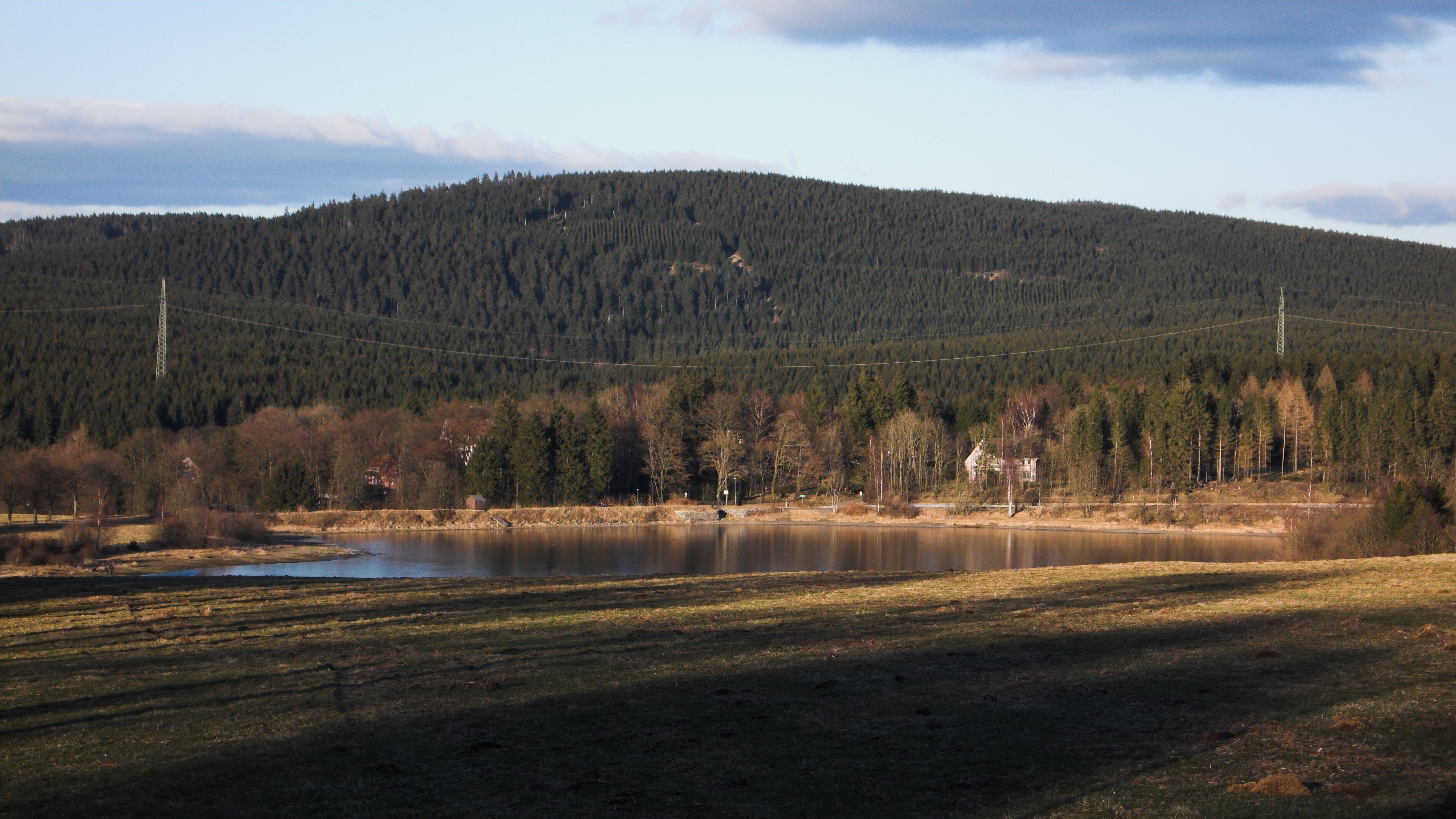 Blick von Zellerfeld zur Schalke, Im Vordergrund der Stadtweger Teich